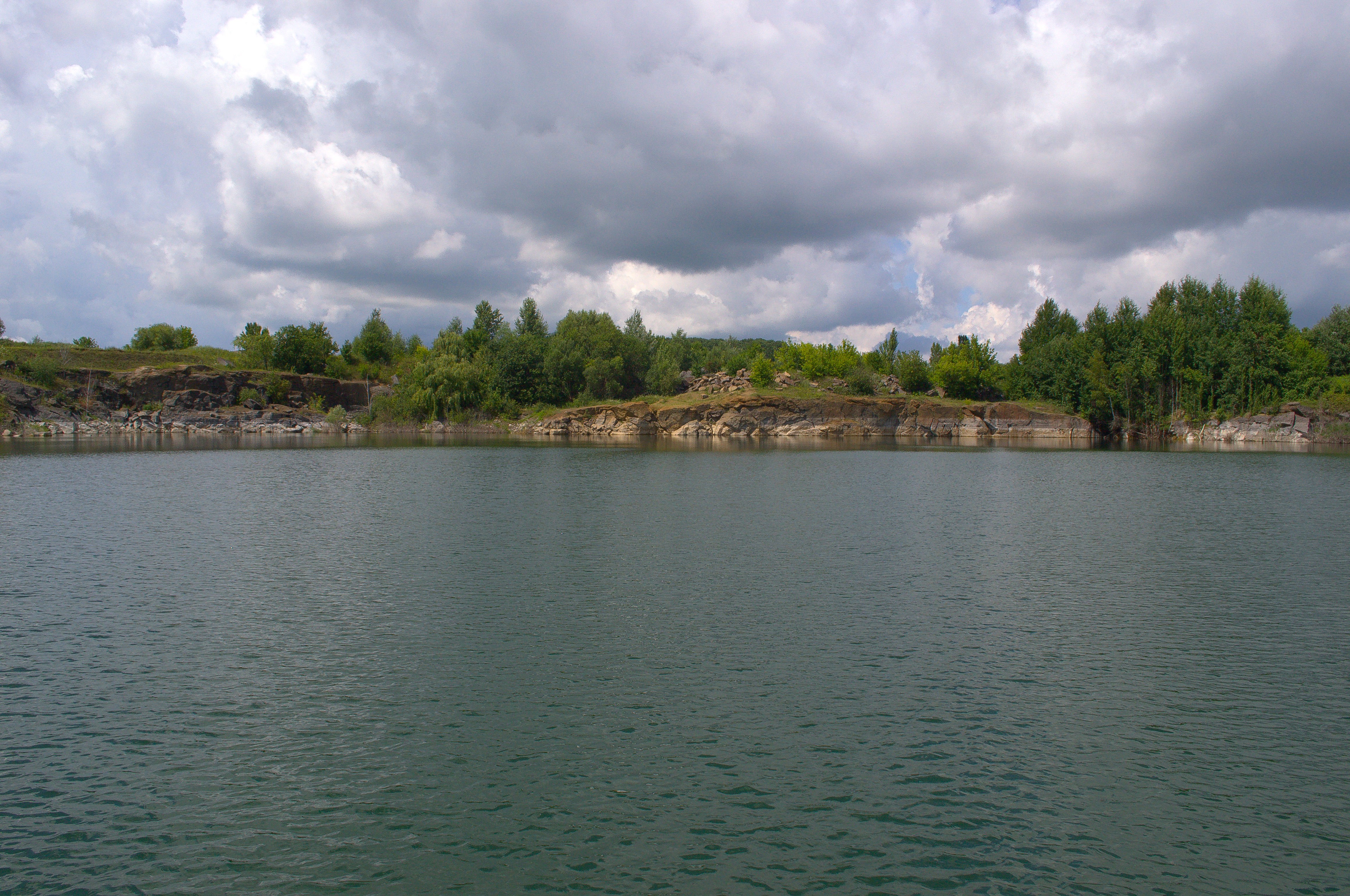 Відслонення іризуючого лабрадориту, Черняхівський р-н, смт Головине, Головинський кар'єр